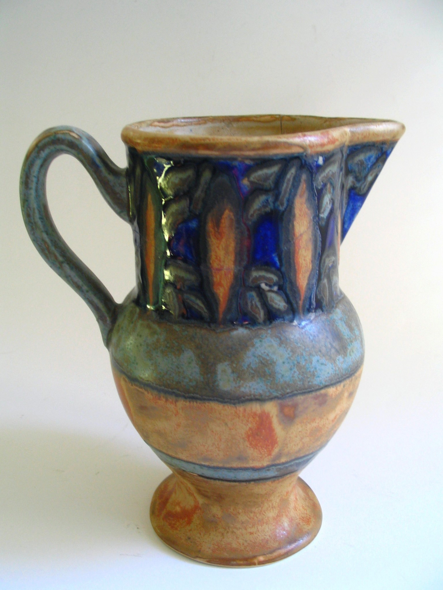 Manufacture Odetta, Frankreich: Krug, Steinzeug, cirka 1930